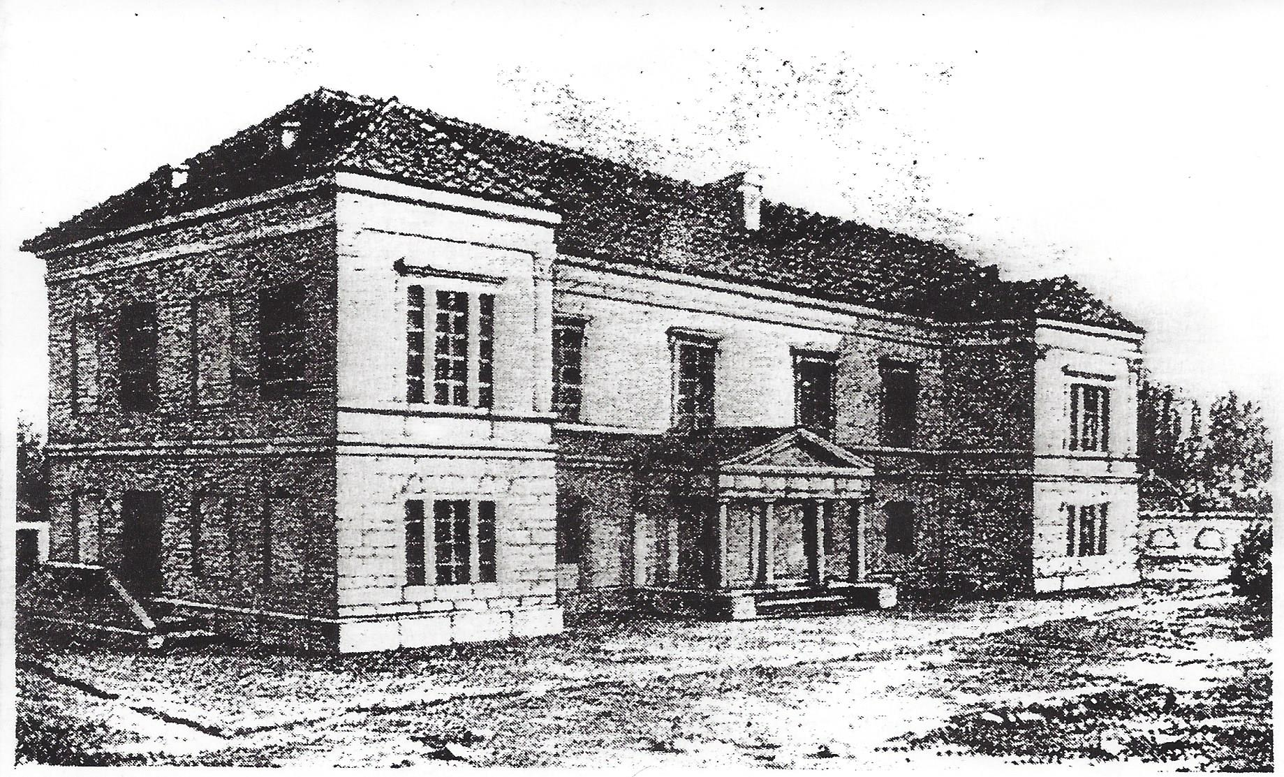 Zeichnung der alten Medizinischen Klinik in Krakau